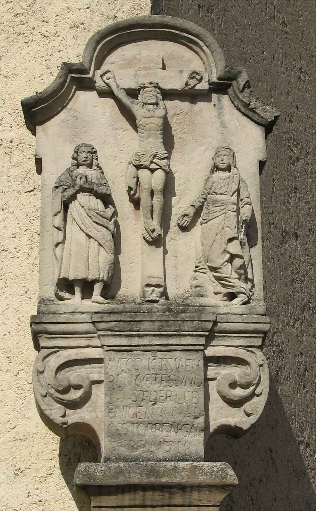 Weekräiz Vis-à-vis vun der Kierch zu Wellesteen.